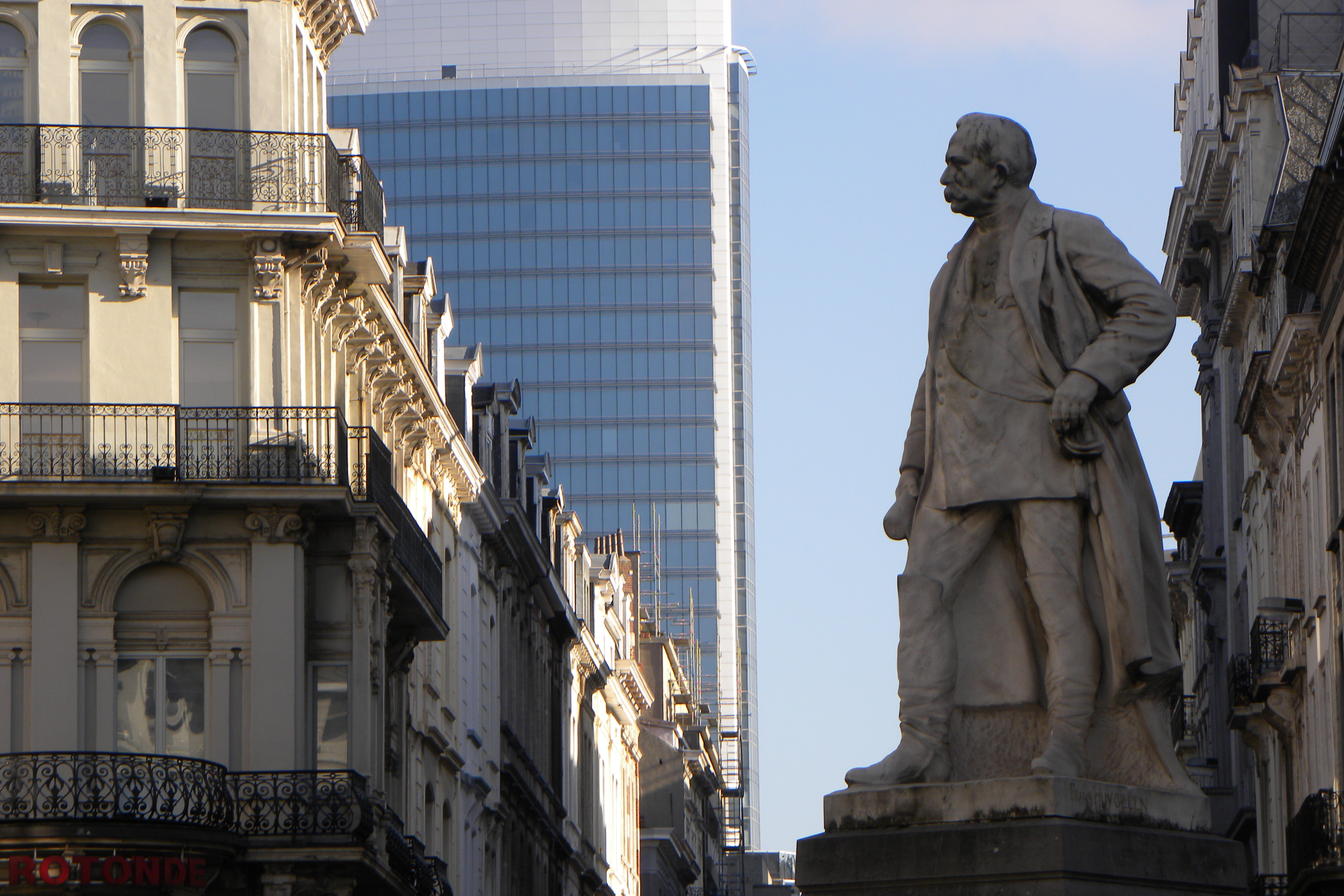 Henri Alexis Brialmont 1821-1903. Monument au carrefour de la rue de Louvain et de la rue Royale à Bruxelles.